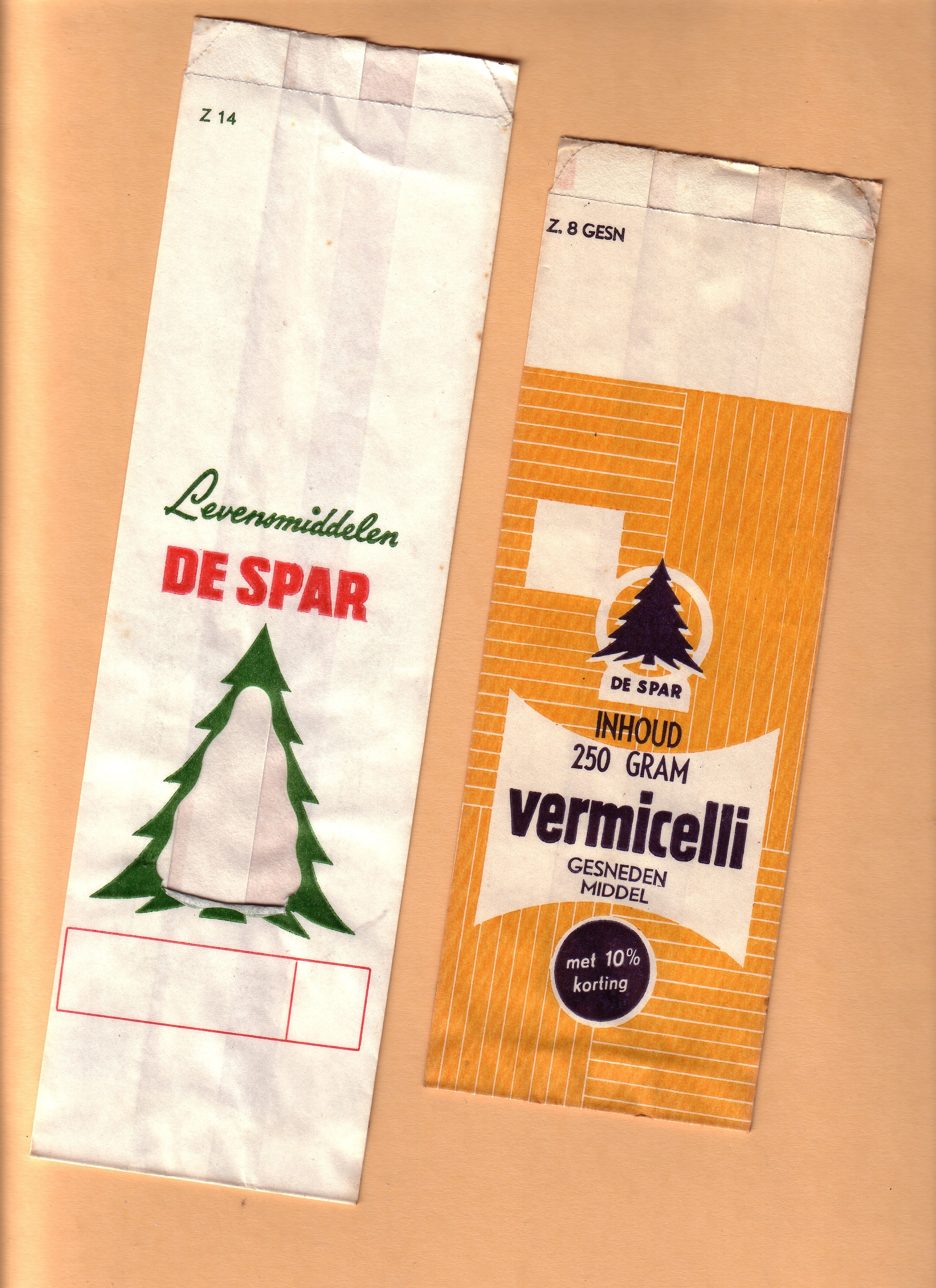 afbeelding van verpakkingsmateriaal van kruideniers